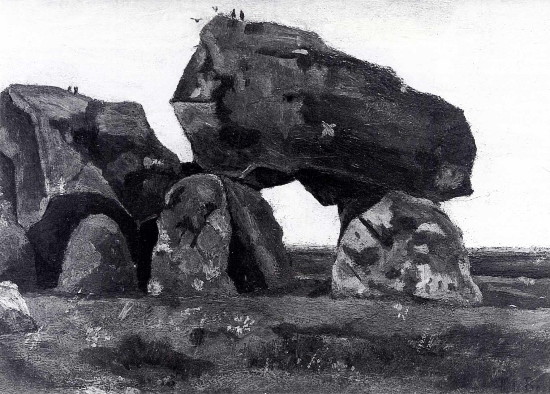 Hunebed